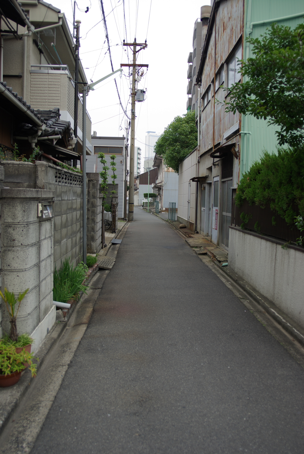 中村遊郭堀跡